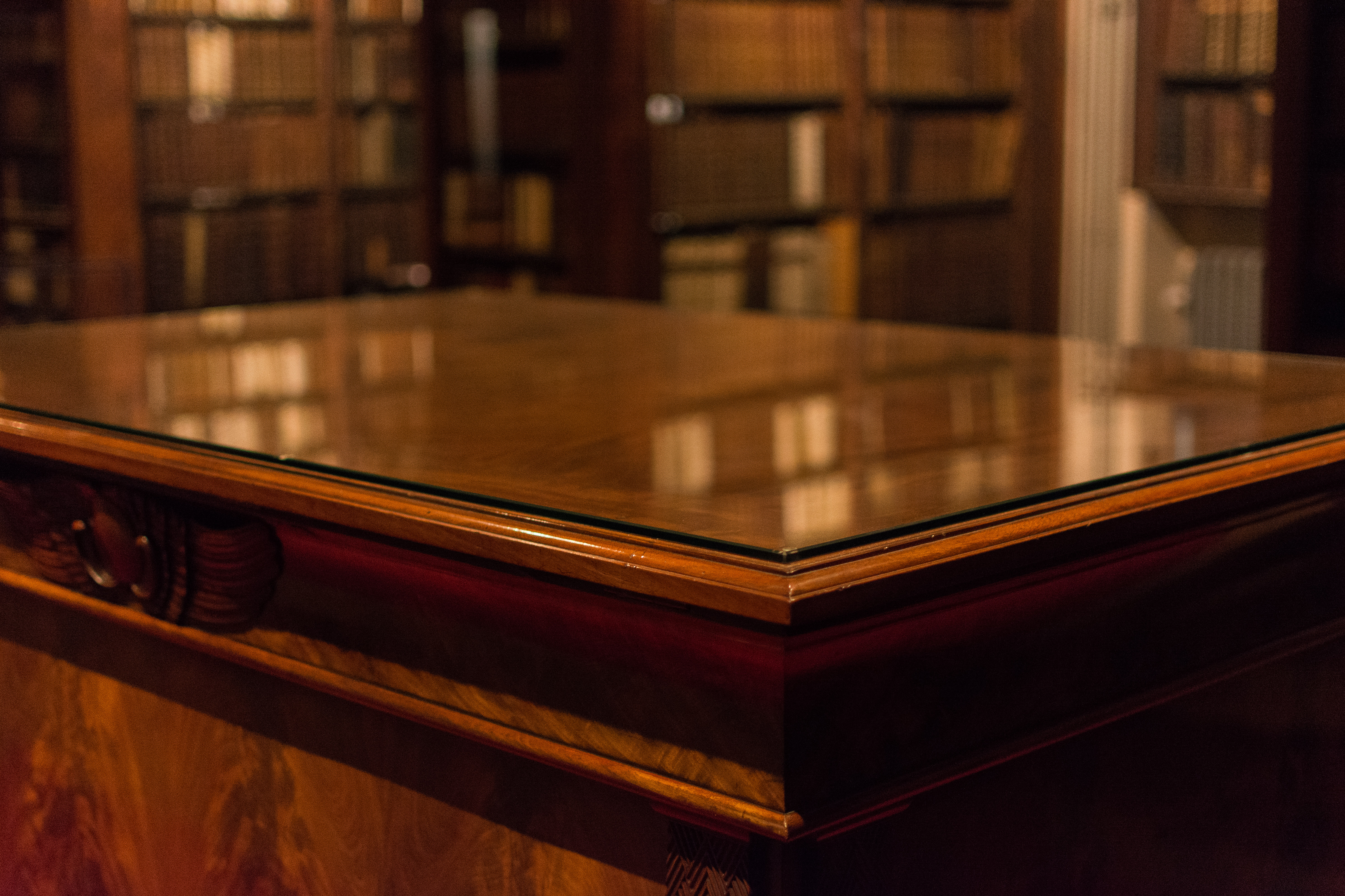 De boeken van Karl Richard Lepsius en de Egyptische kast zijn een tastbaar gevolg van de grote belangstelling in de 19de eeuw voor het oude Egypte. This is a file created at the museum: Hendrik Conscience Heritage Library in Antwerp